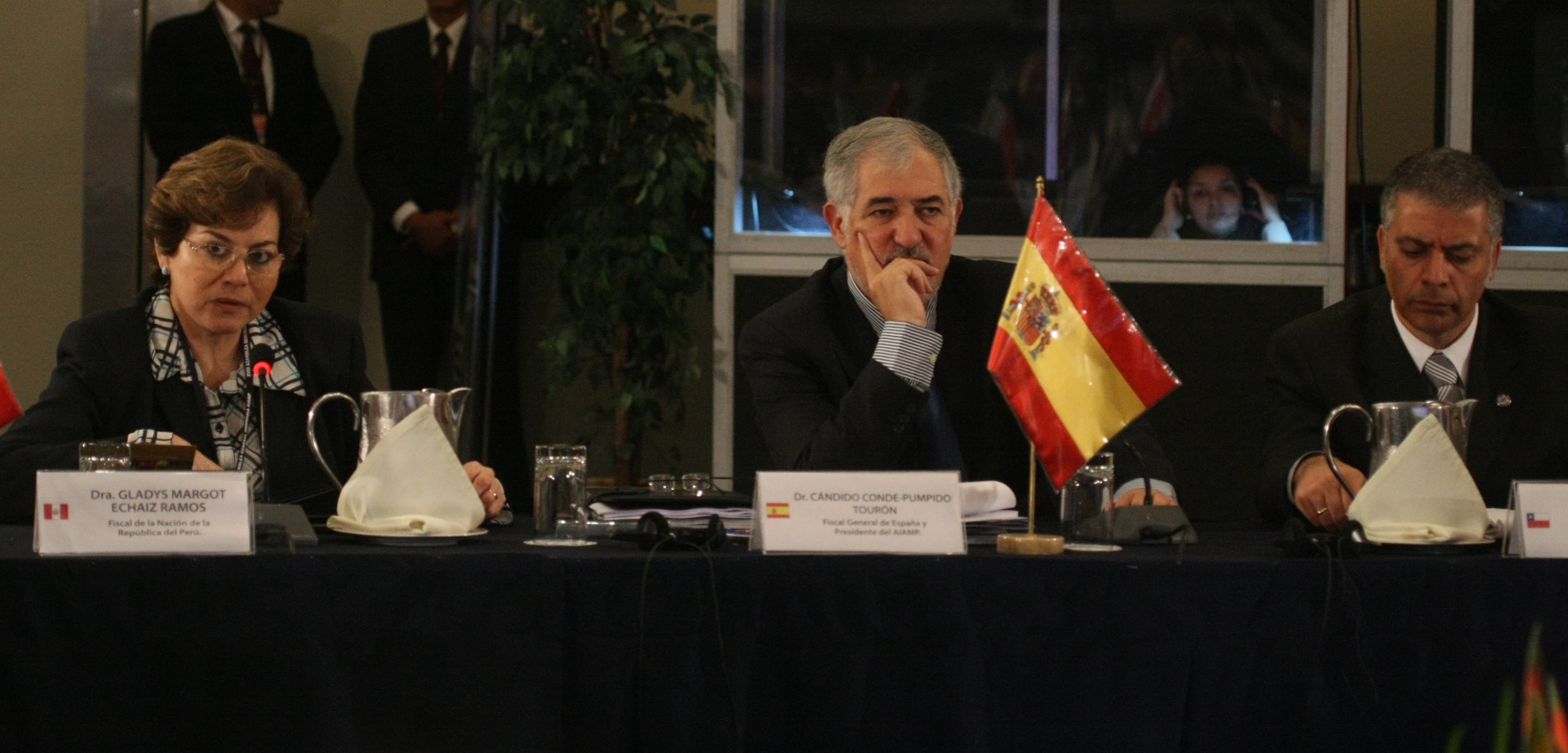 La Dra. Gladys Margot Echaíz Ramos, Fiscal de la Nación de la República de Perú, con el Presidente y el Secretario General de la AIAMP en la XVIII Asamblea General de Lima en 2010.